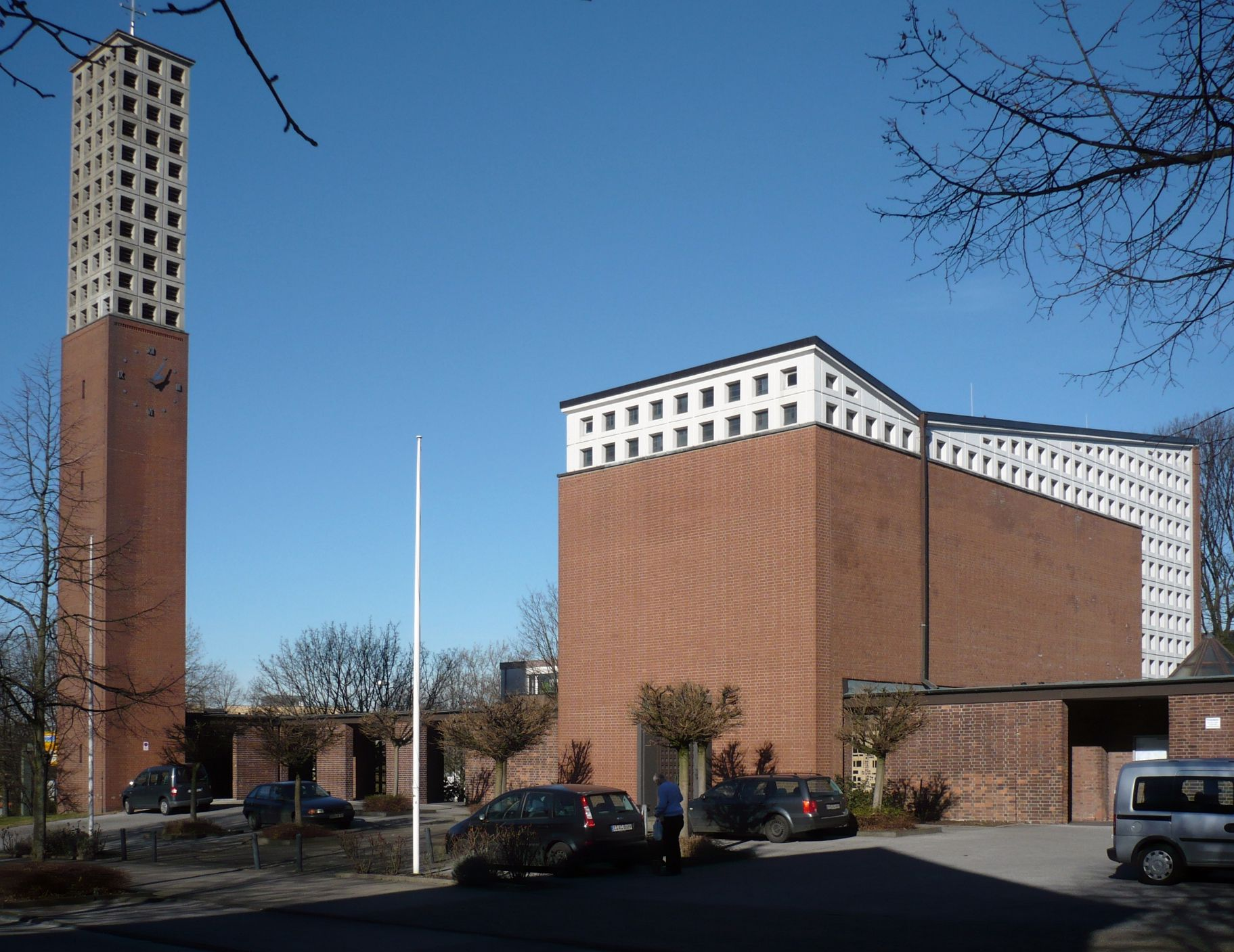 Kirche St. Ignatius in Essen-Südviertel, erbaut 1960 durch Emil Jung